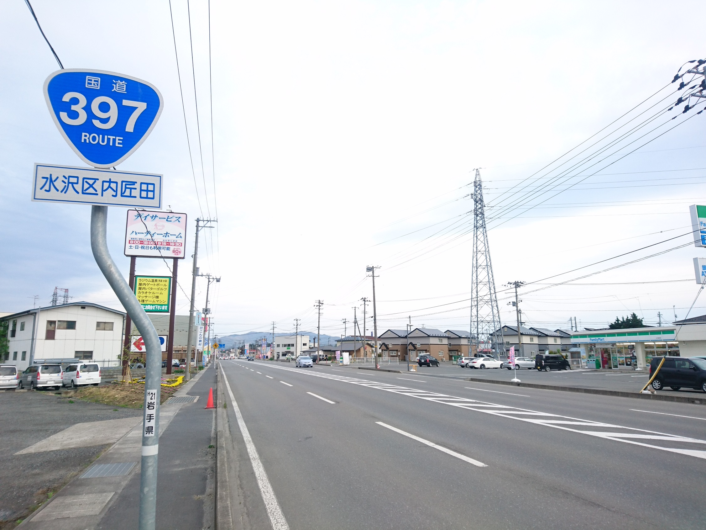 奥州市水沢区内匠田付近の国道397号。